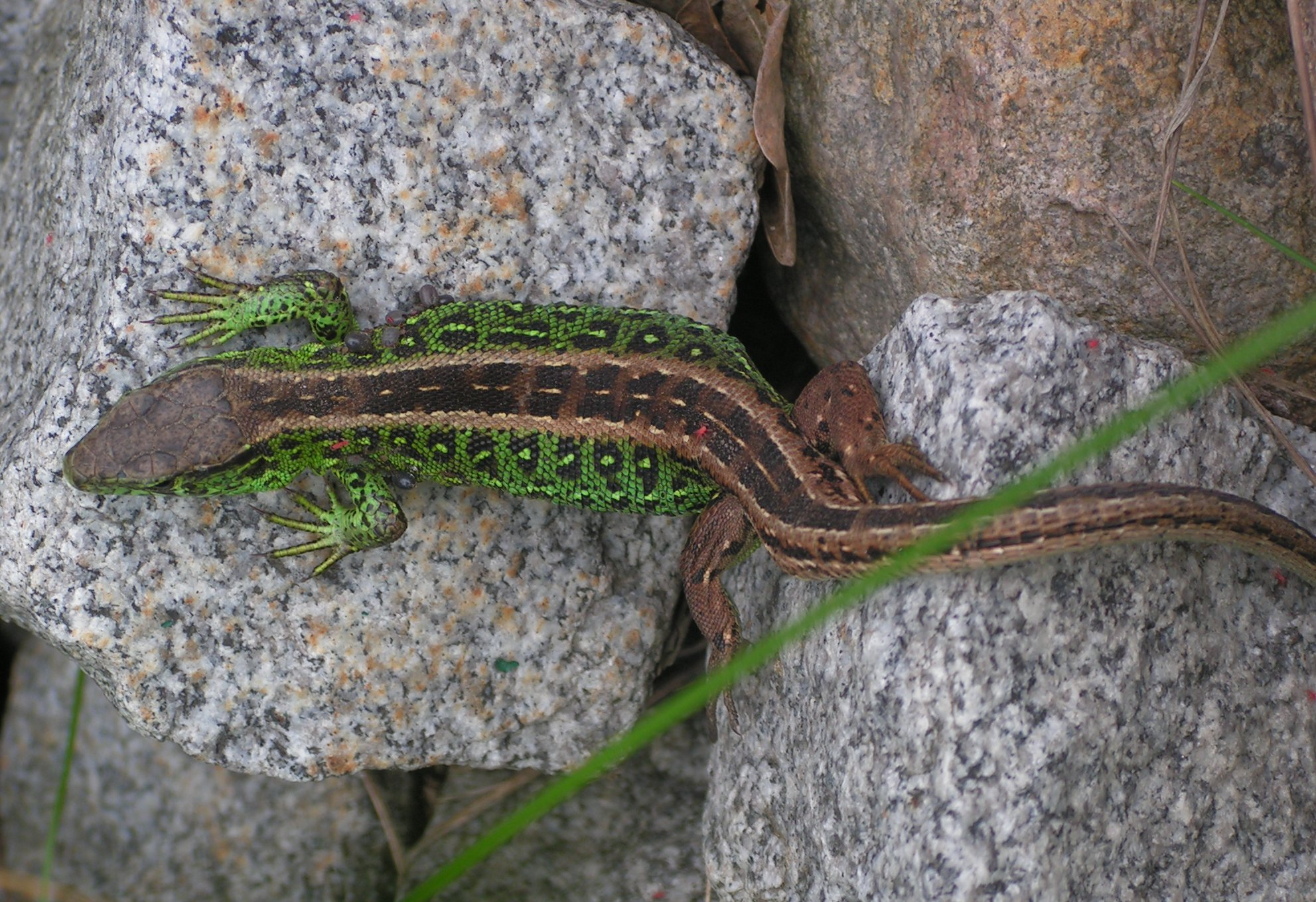 Lacerta agilis - male